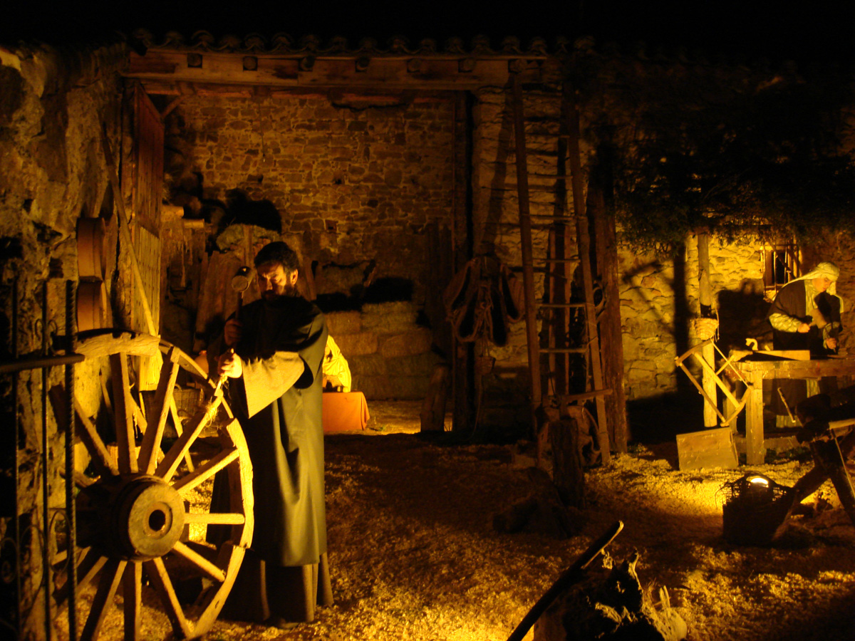 Actualmente, el Belén Viviente de Buitrago es uno de los más importantes de España. Cuenta con 39 escenas repartidas a lo largo de un recorrido de 1.300 metros en las que participan más de 200 actores, 15 técnicos y 35 agentes del orden. Su importancia como evento cultural está avalada por sus más de 25.000 visitantes anuales, además de por diferentes reconocimientos nacionales e internacionales, como el "Premio Internacional Mundo Teatre" en el año 2000, o la declaración de "Fiesta de Interés Turístico" en el 2001.